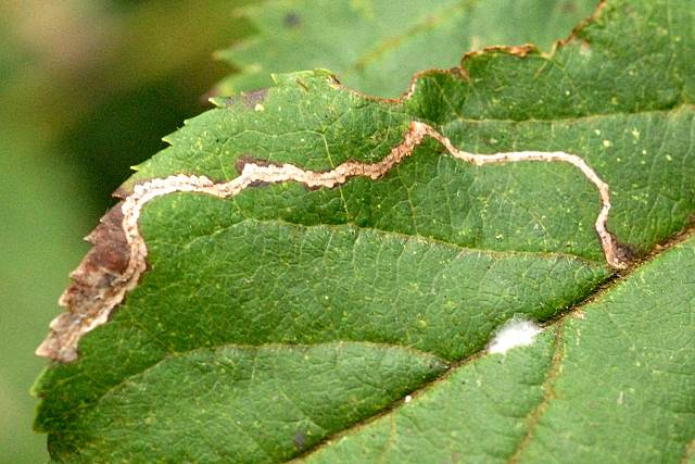 Lyonetia clerkella from Commanster, Belgian High Ardennes .